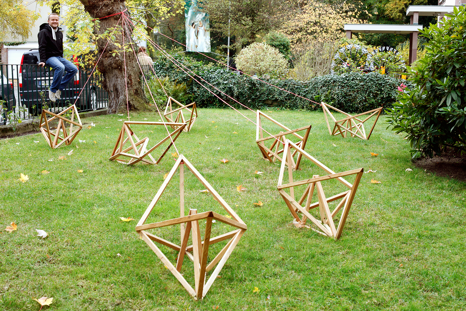 "Im Hafen" hat der Künstler Edin Bajrić, der hier auf dem Gartenzaun posiert, sein Werk genannt: "Der Baumstamm als Ankerstelle. Ist es ein Hafen ohne Wasser? ... Unterwasser? ... die Schiffe in ihrer Machart Skelette ... das Papierschiffchen: Ein Symbol für Kindheit, Zerbrechlichkeit, Reinheit, Reise, läßt uns der Künstler wissen durch den Ausstellungskatalog Wintergärten V ...